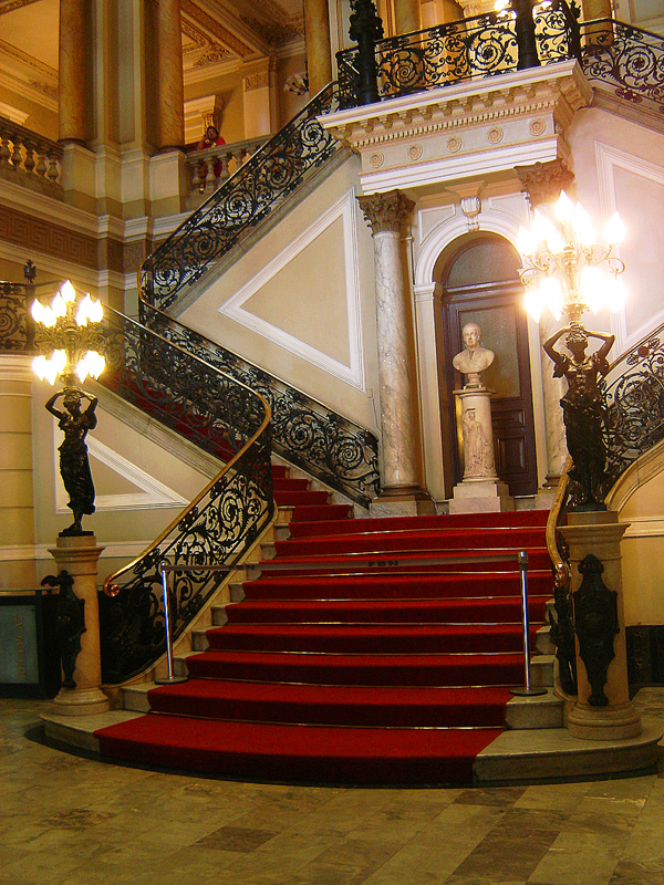 A Biblioteca Nacional do Rio de Janeiro.